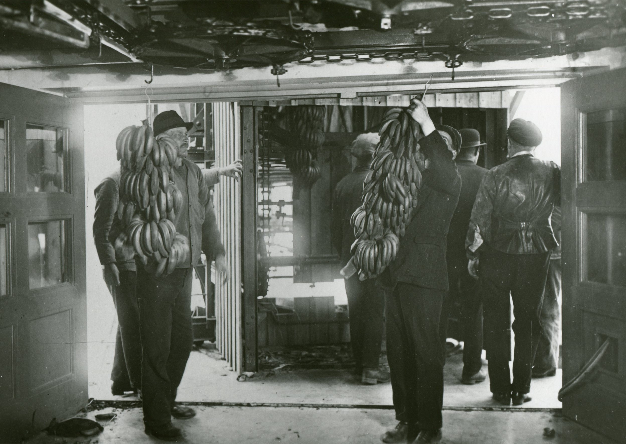 Banan-Kompaniet i Stockholm: bananstockar tas in från fartyg